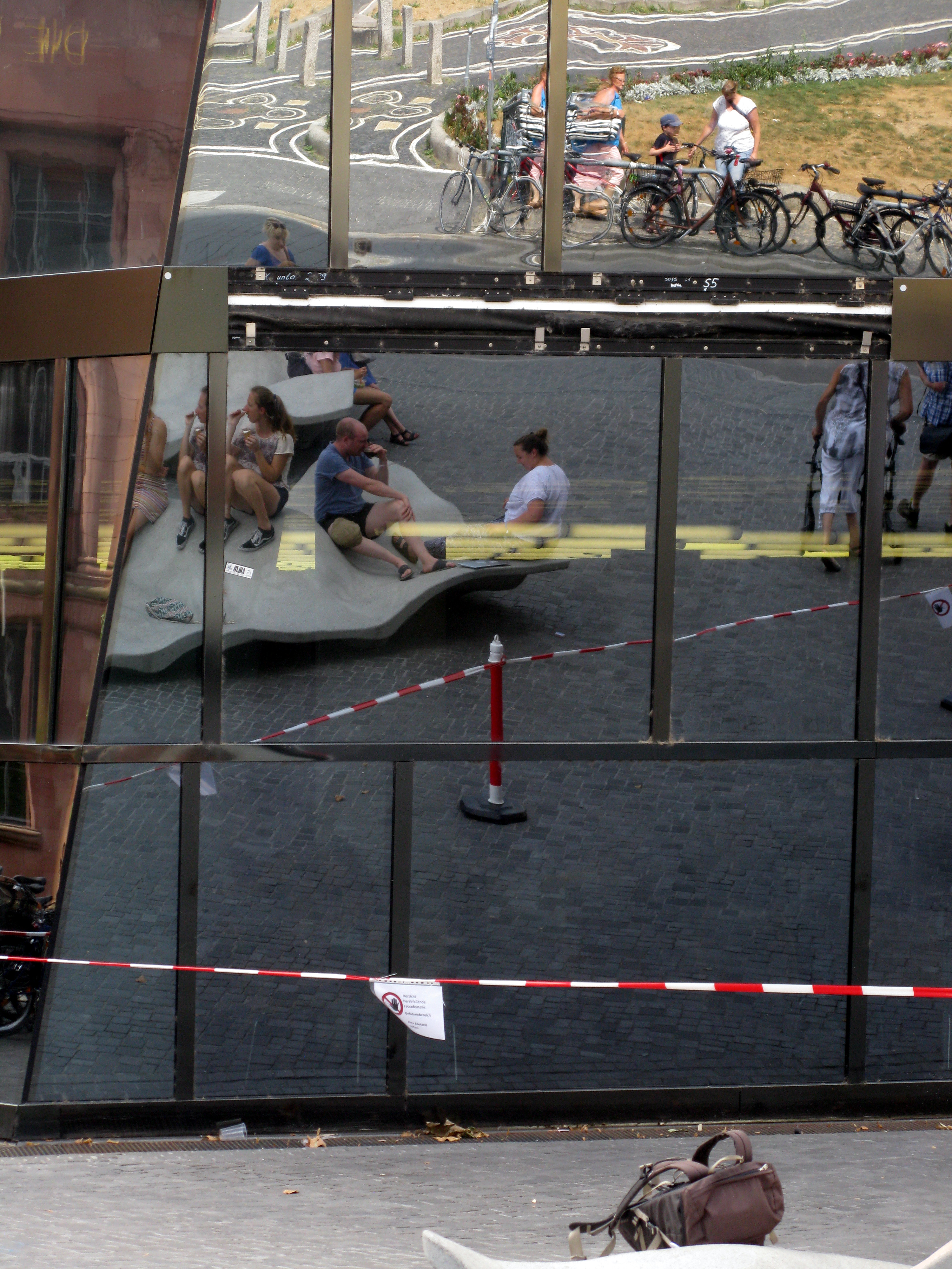 Fassade der Freiburger Universitätsbibliothek: Wegen herabfallender Fassadenteile wurde die Umgebung zunächst mit einem Flatterband abgesperrt.